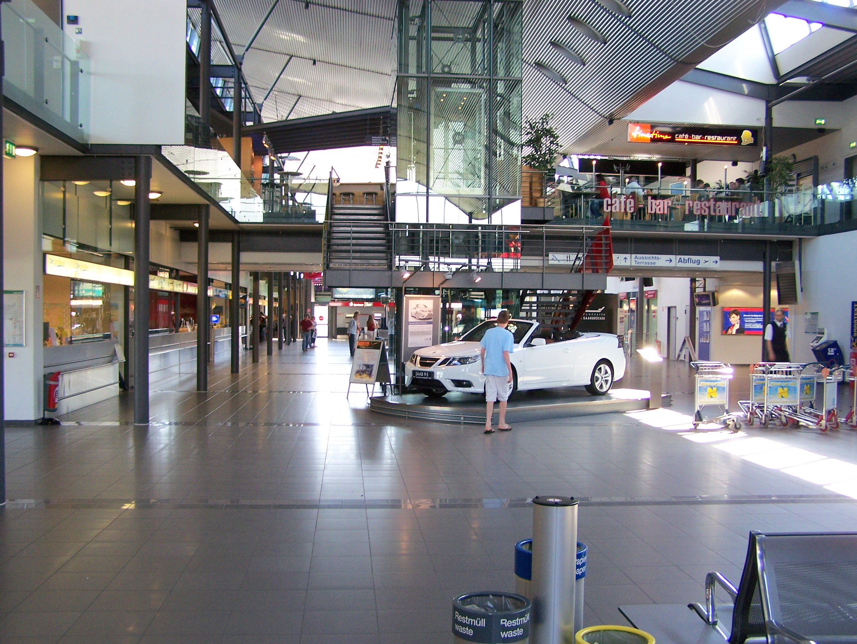 Flughafen Saarbrücken, Blick ins Terminal 1 Airport Saarbrücken/Germany, view into terminal 1 Aéroport de Sarrebruck/Allemagne, terminal 1